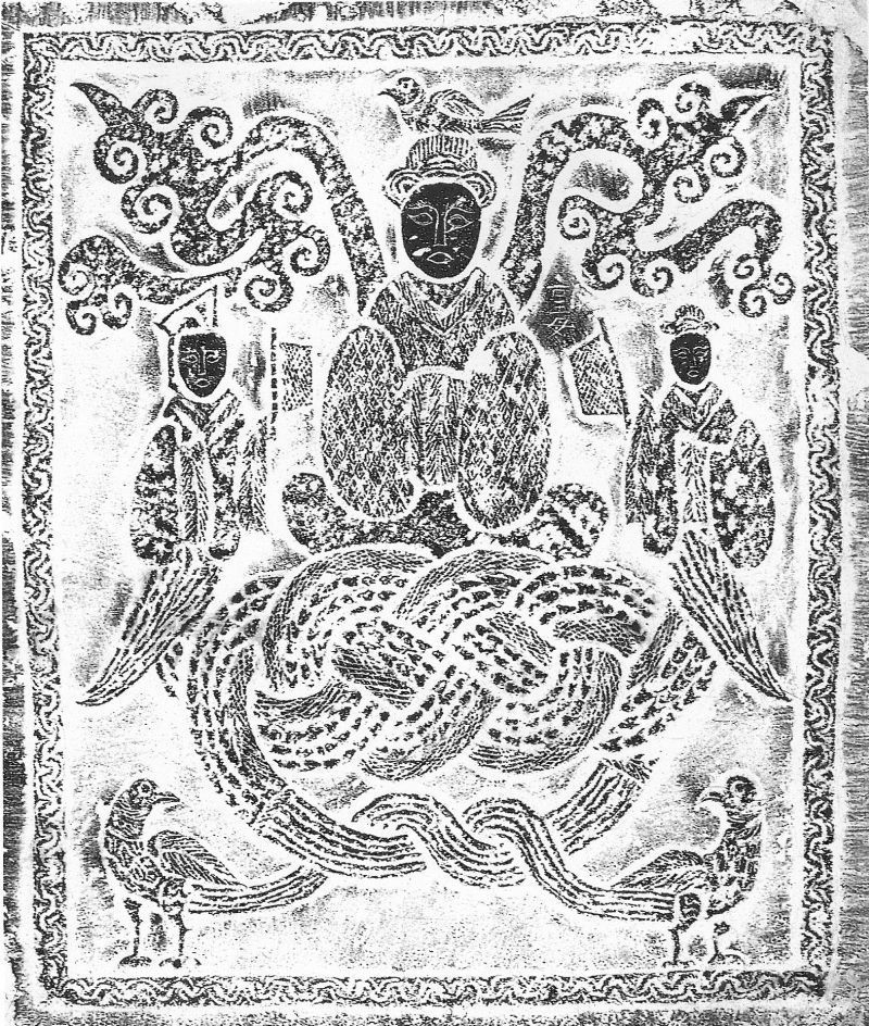 Han dynasty mural representing the Queen Mother of the West. 西王母 Xīwángm